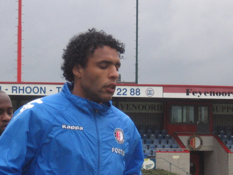 Pierre van Hooijdonk during training (photo by GHoeberX)